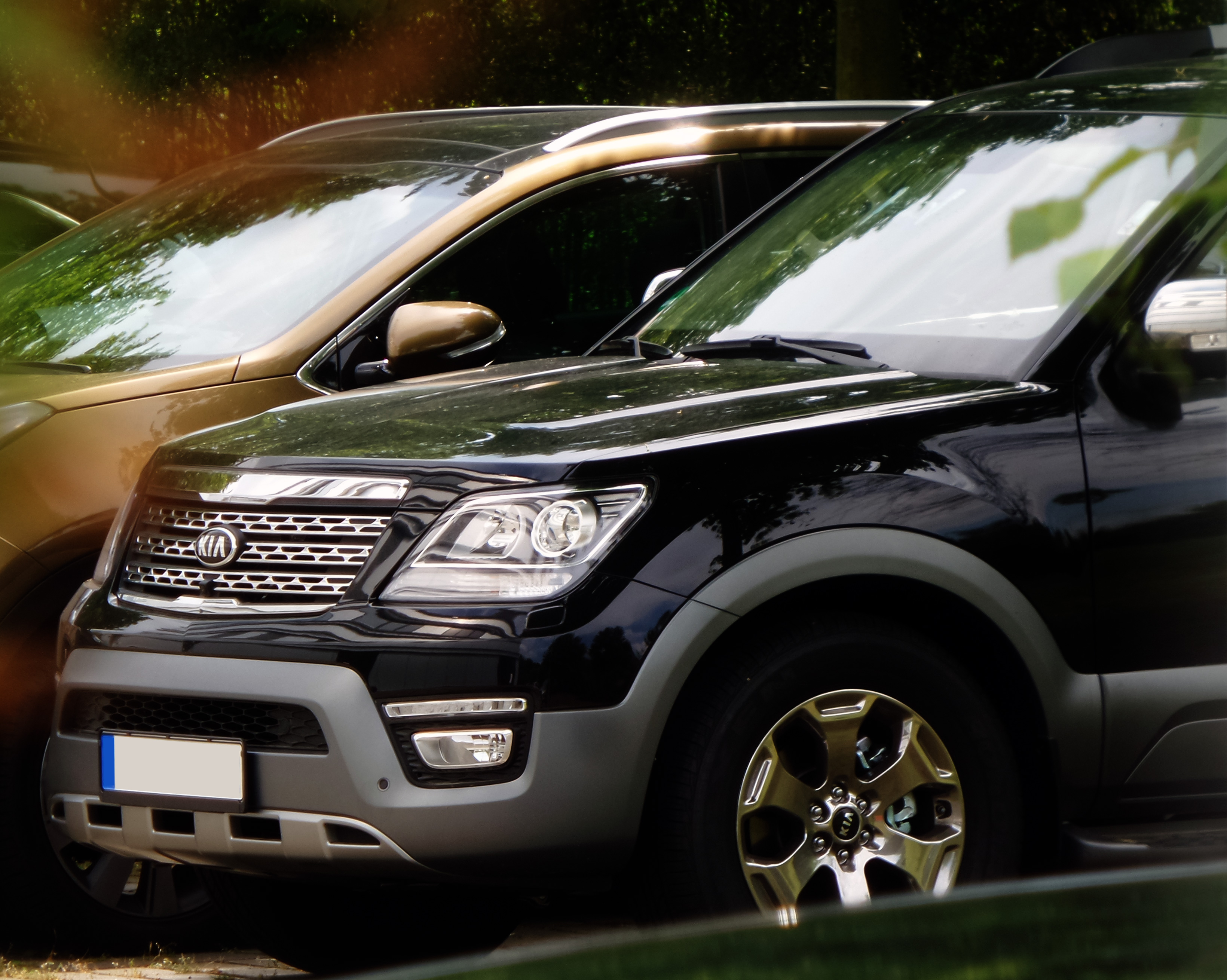 Kia Borrego 2016